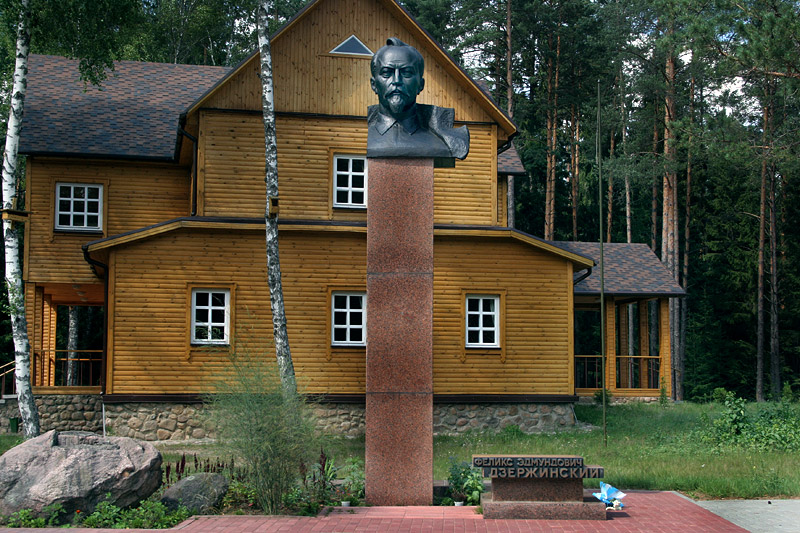 Fotografia autorstwa Roberta Danieluka